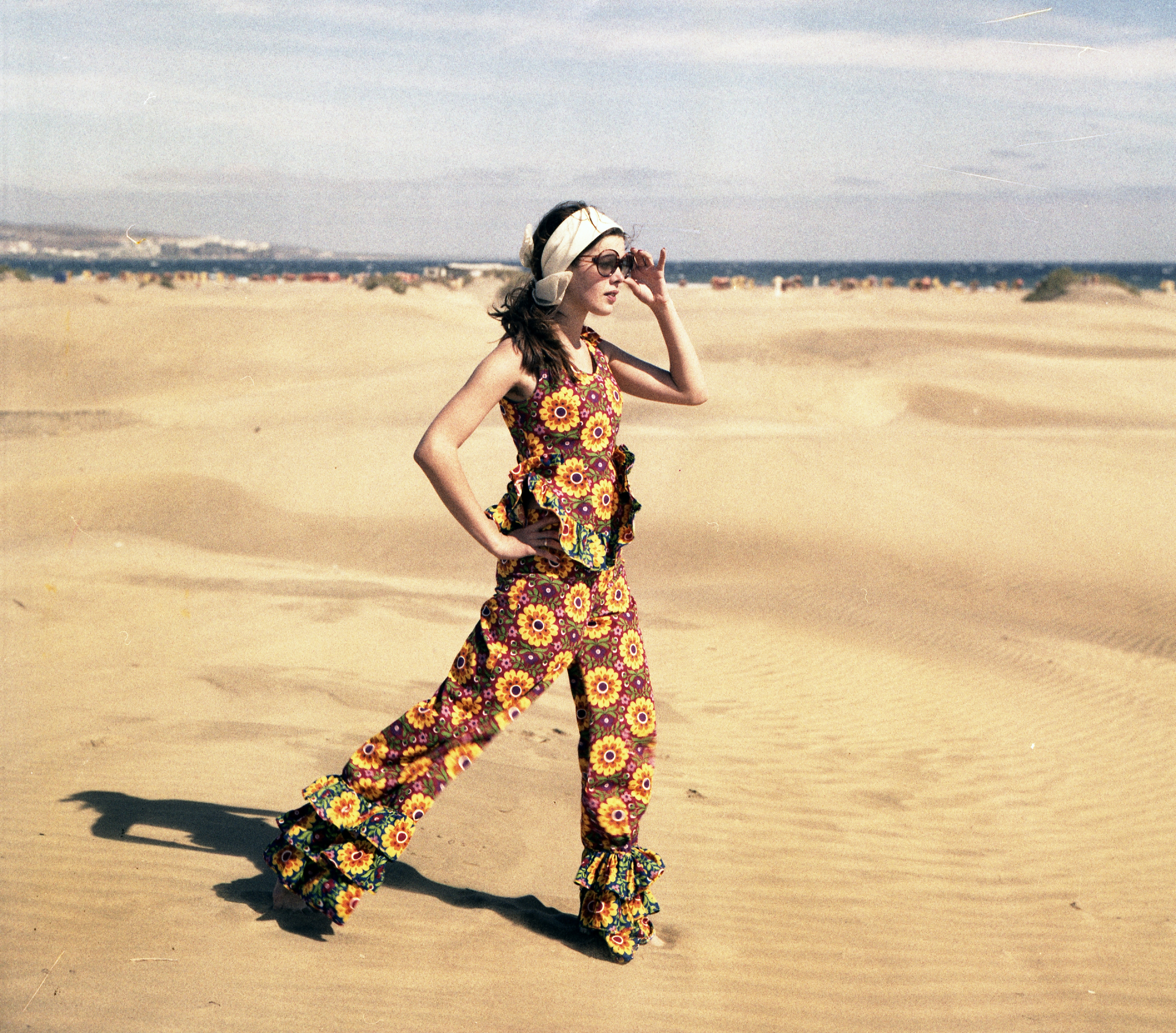 Felkai Anikó manöken. Location: Spain, Canary Islands Tags: colorful, fashion, desert, lady, dungarees, shades, head wrap Title: Felkai Anikó manöken.